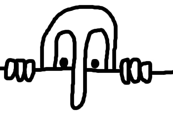 Kilroy-Zeichnung